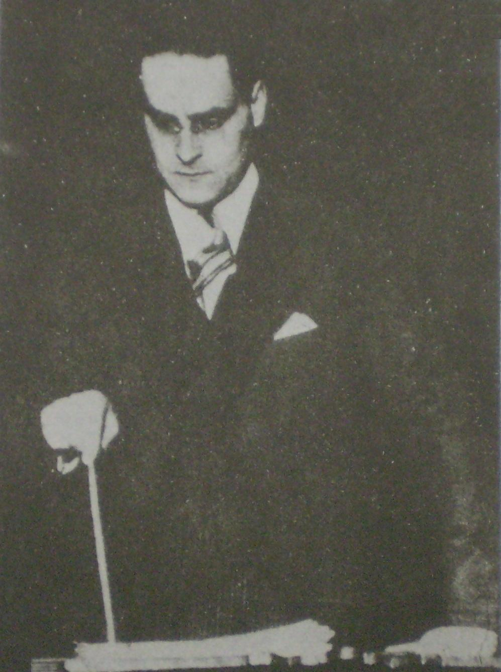 Juan José Castro